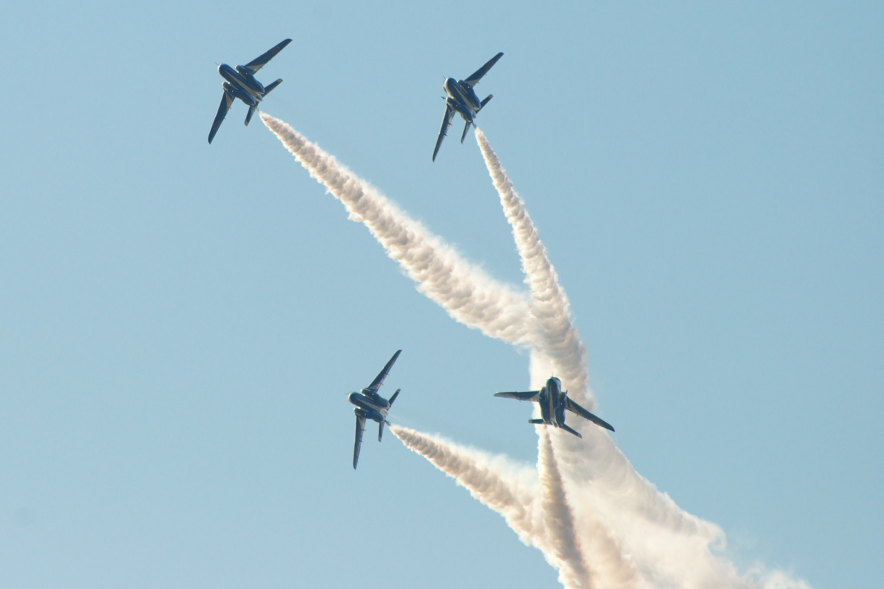 新田原基地航空祭2007より。編隊飛行から各機がブレイクするところ。